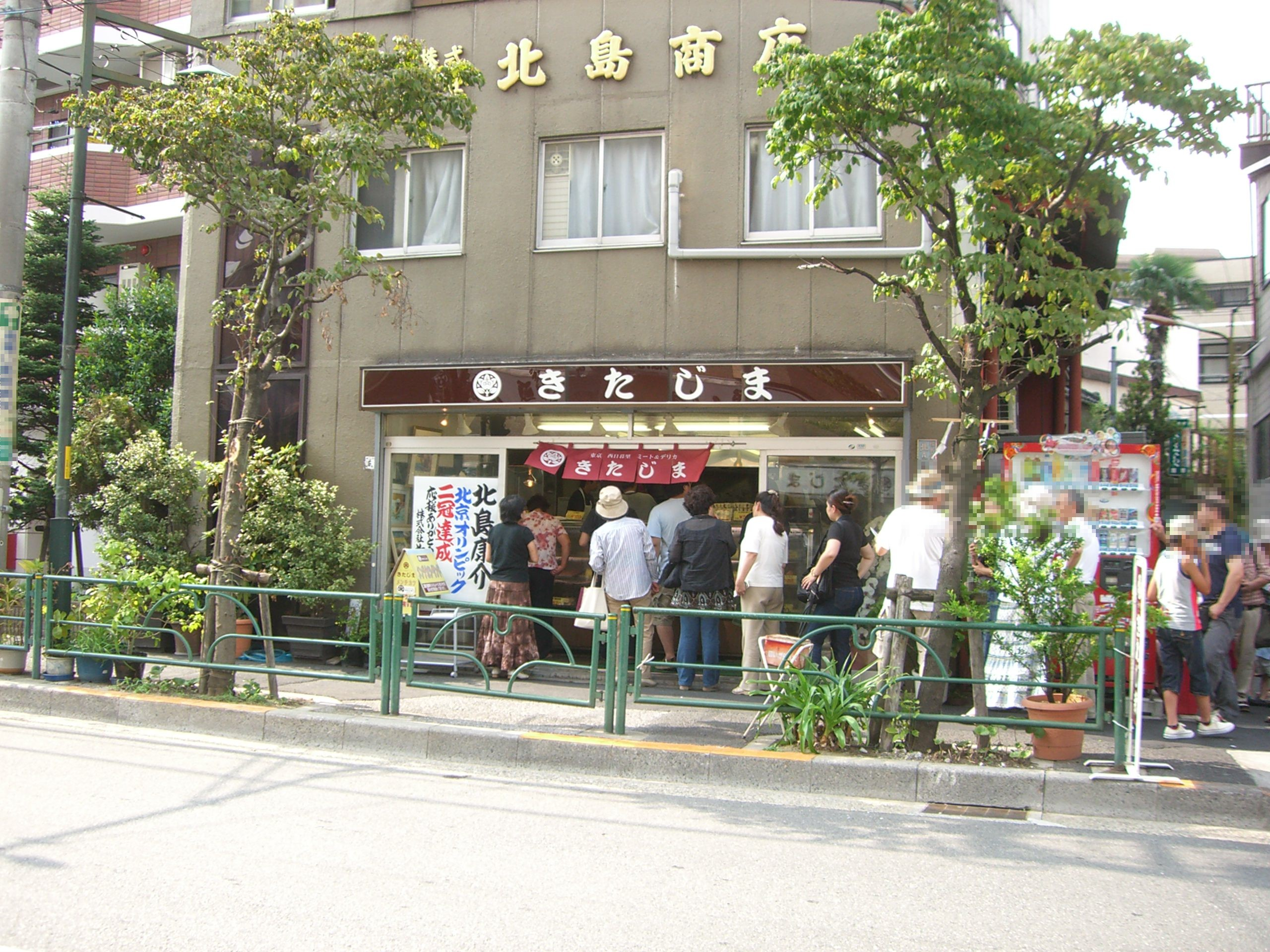 北島商店の模様